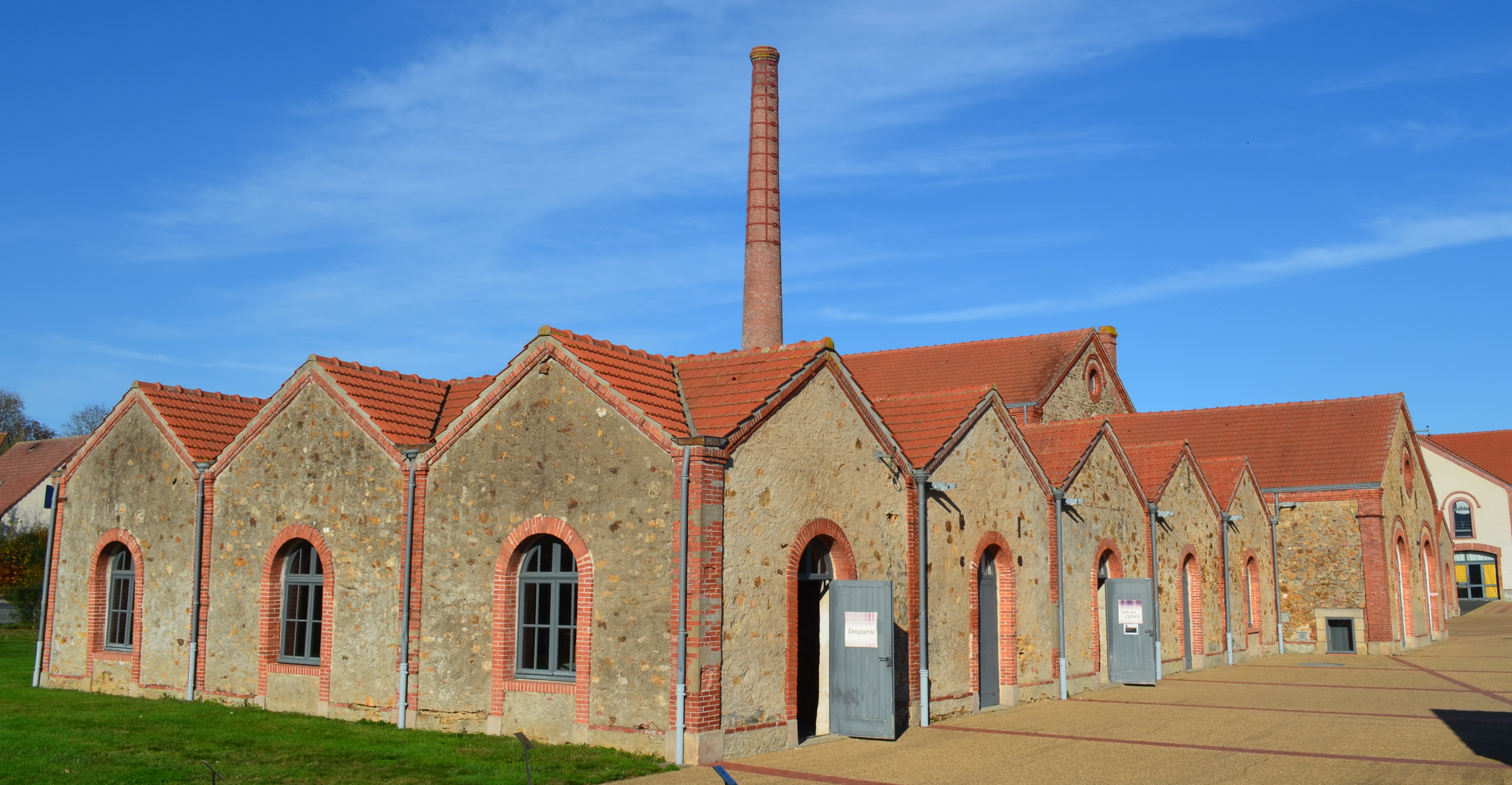 Ancienne blanchisserie, actuel musée du textile - Cholet (Maine-et-Loire)